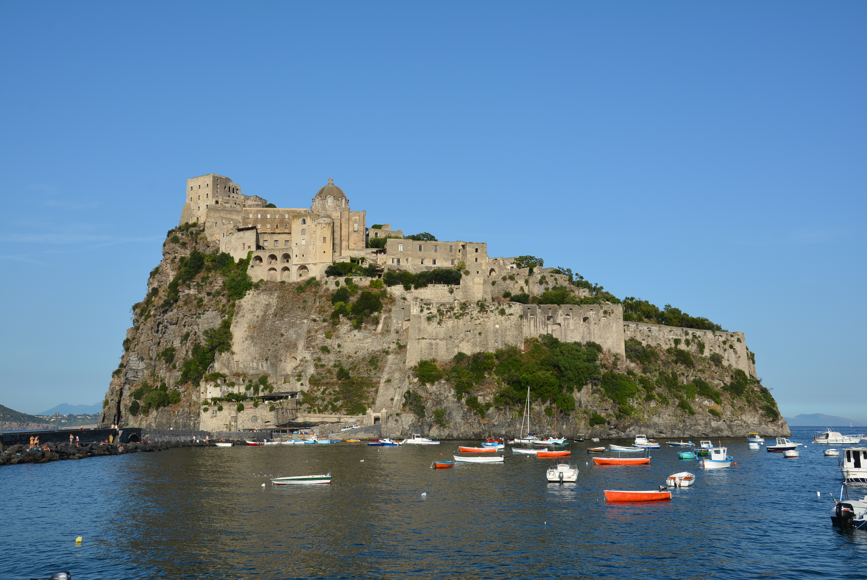 Il castello Aragonese di Ischia